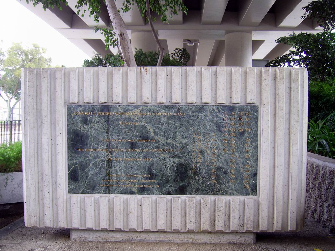 中文（香港）: 連結窩打老道、歌和宅街及聯合道之天橋系統，於1985年開通的紀念石。